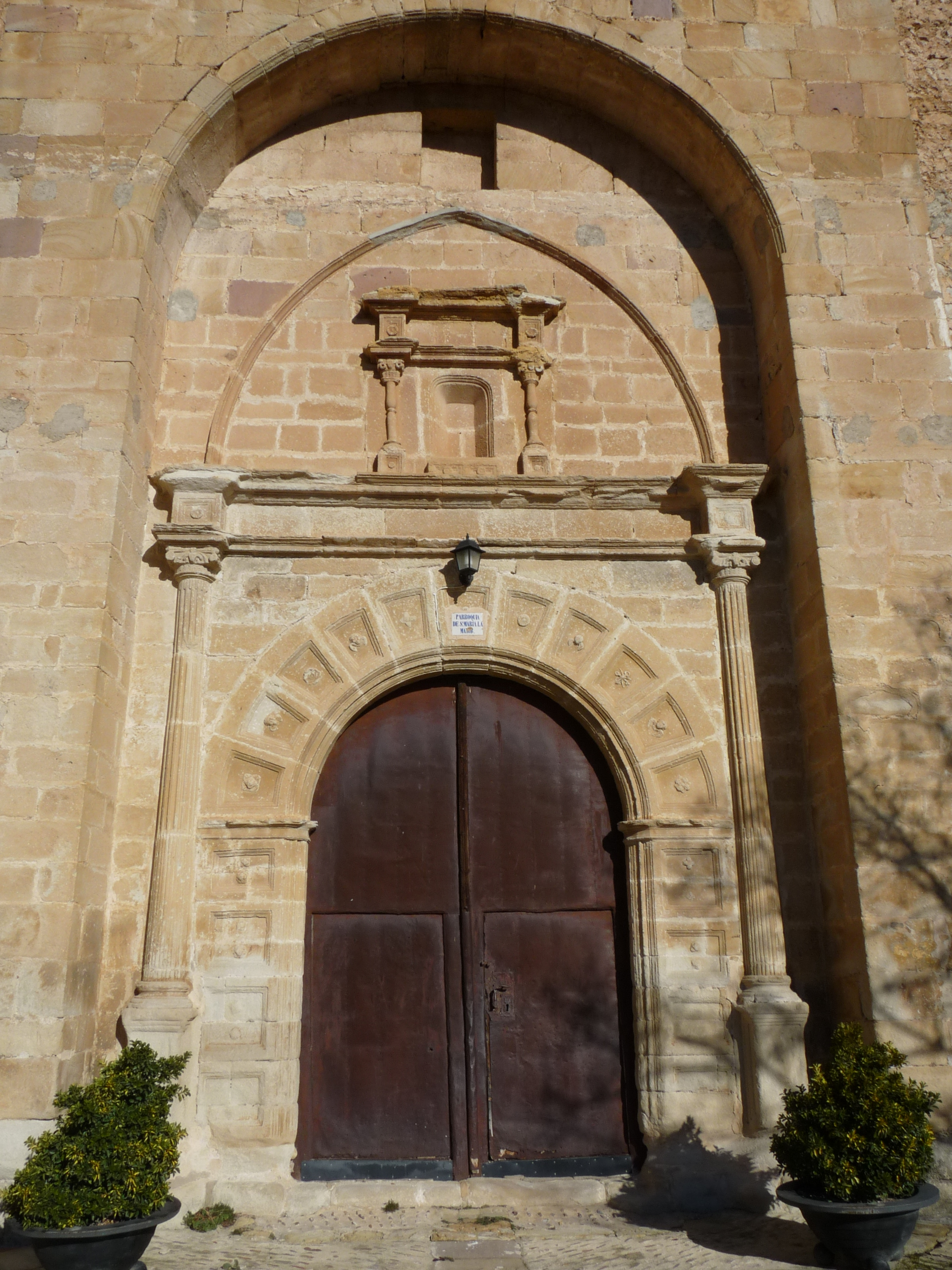 Ciria - Iglesia de Santa María la Mayor - Portada